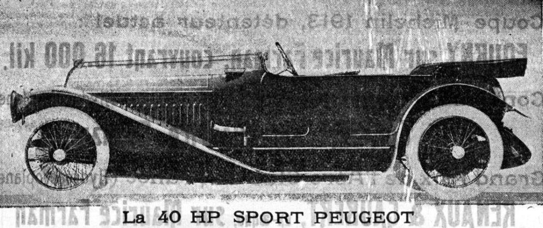 La Peugeot Type 147 Sport 40 HP (1914).